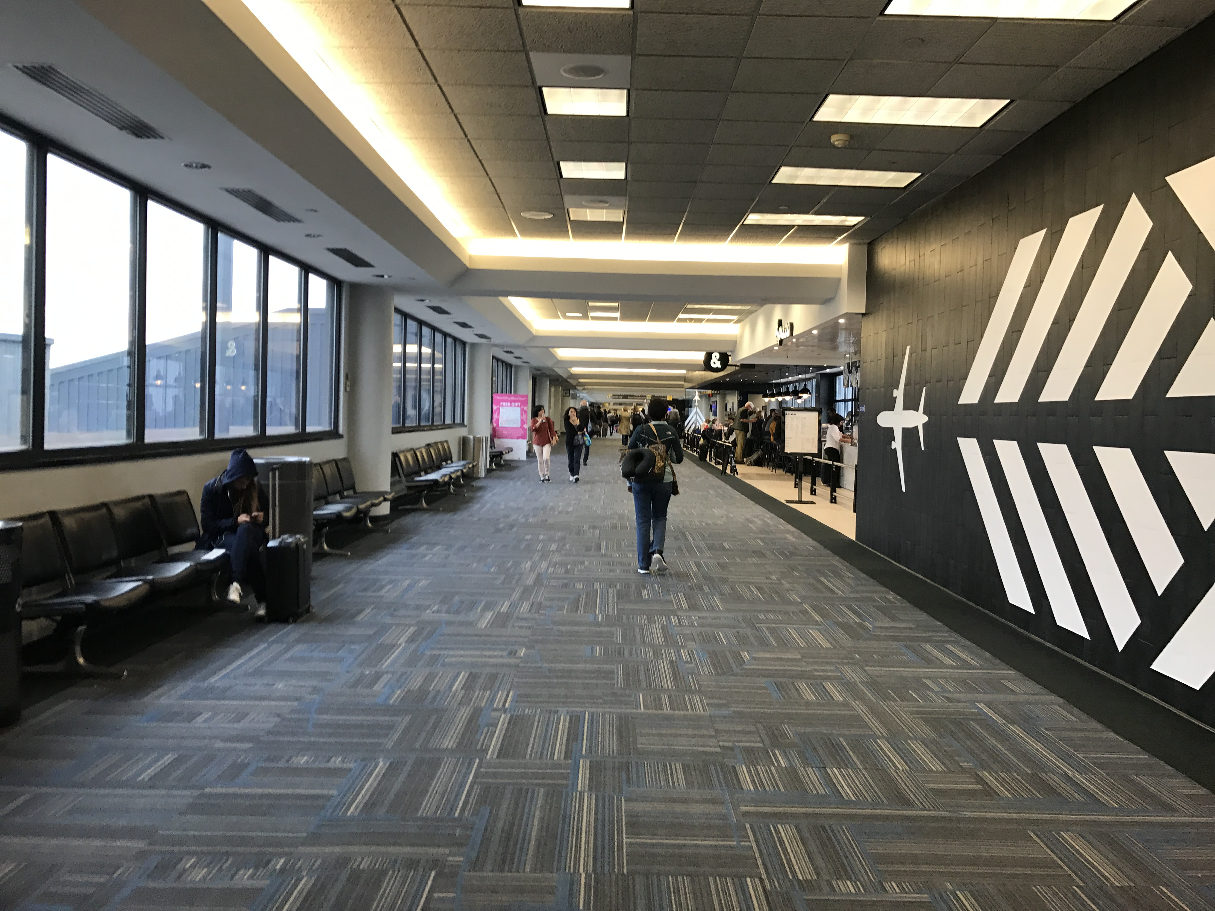 Pasillo del Aeropuerto Internacional de Washington Dulles.